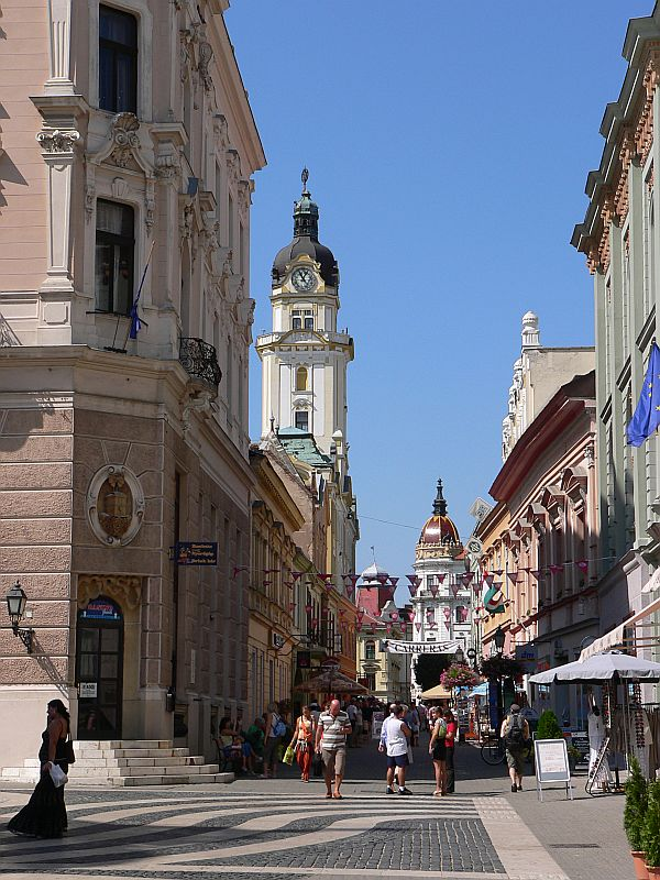 Király Straße in Pécs